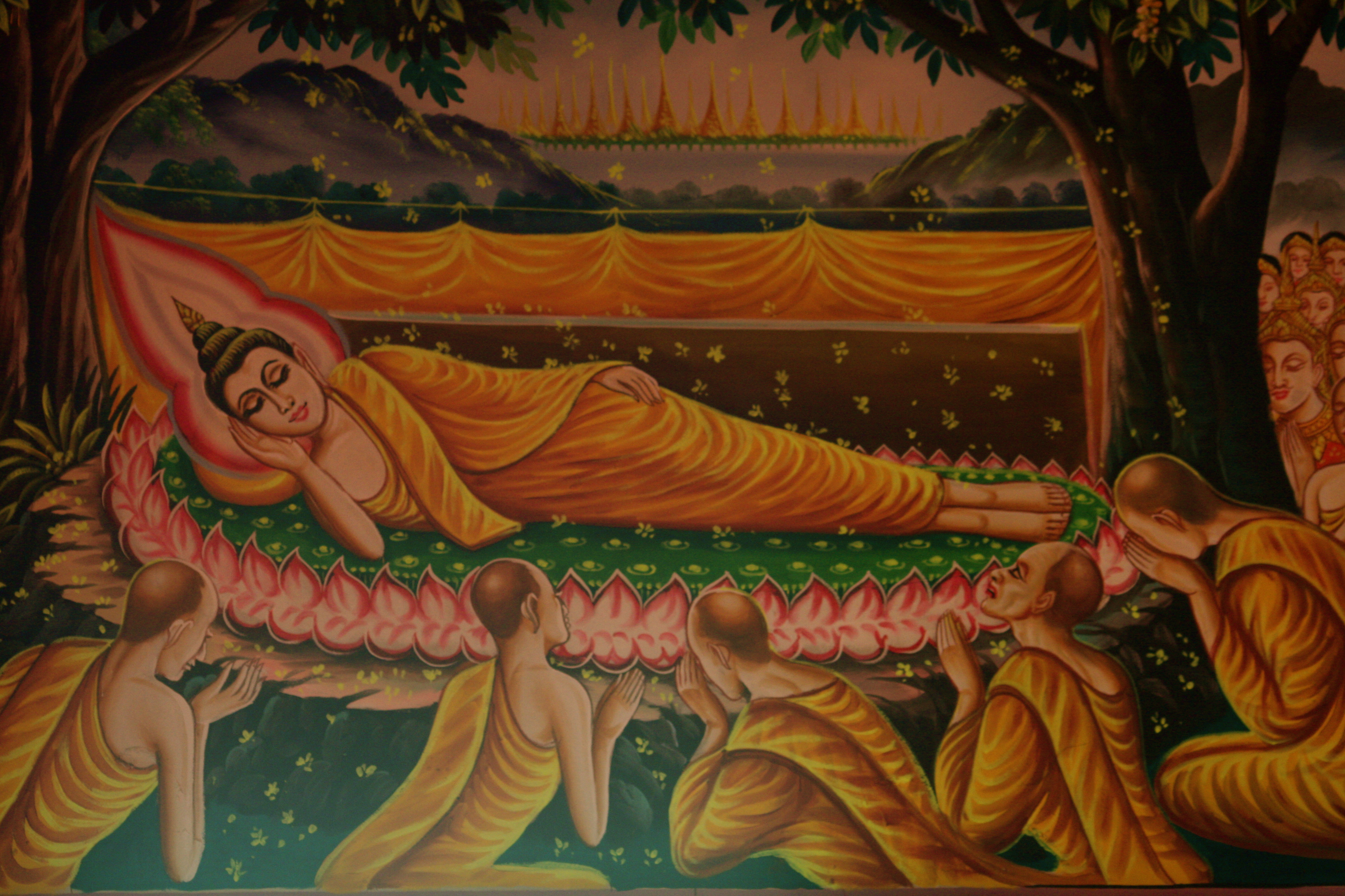 Parinirvana